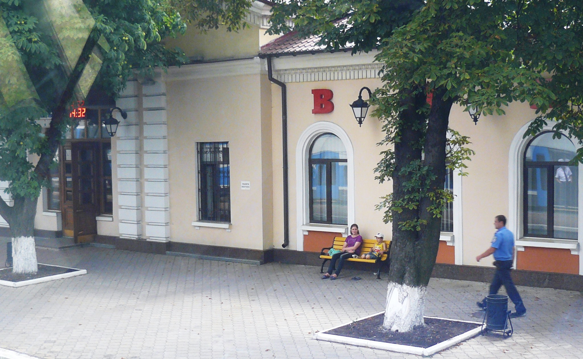 Volnovaha.